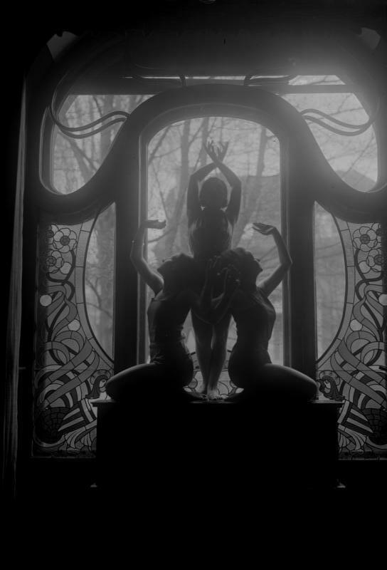 Aus dem Coreographischen Institut Laban in Berlin-Grunewald! Schönheit im Tanz. Eine interessante Figurengruppe von Tanzschülerinnen Labans vor dem Fenster.